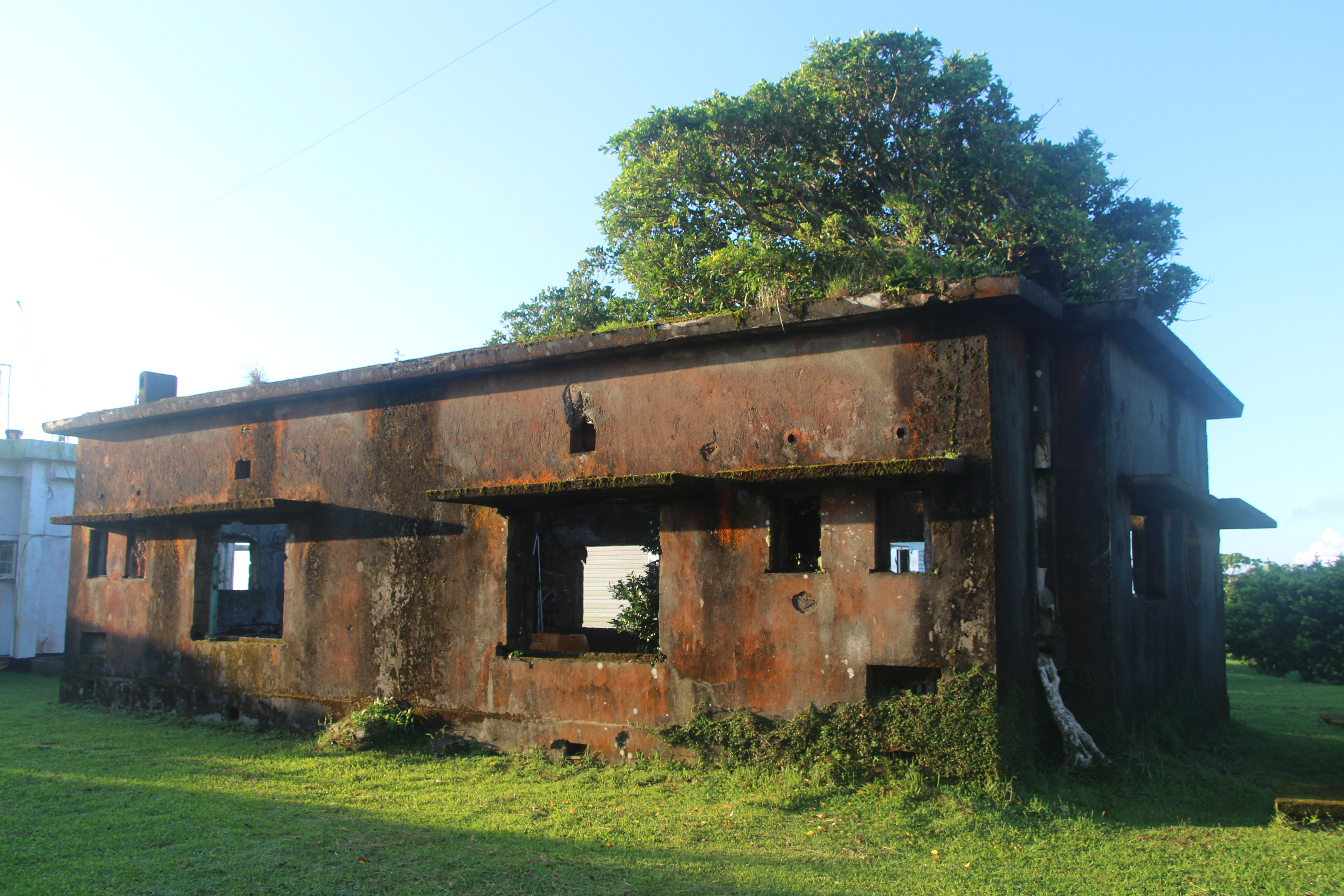 台灣總督府氣象台紅頭嶼測候所(蘭嶼氣象站 舊建築)